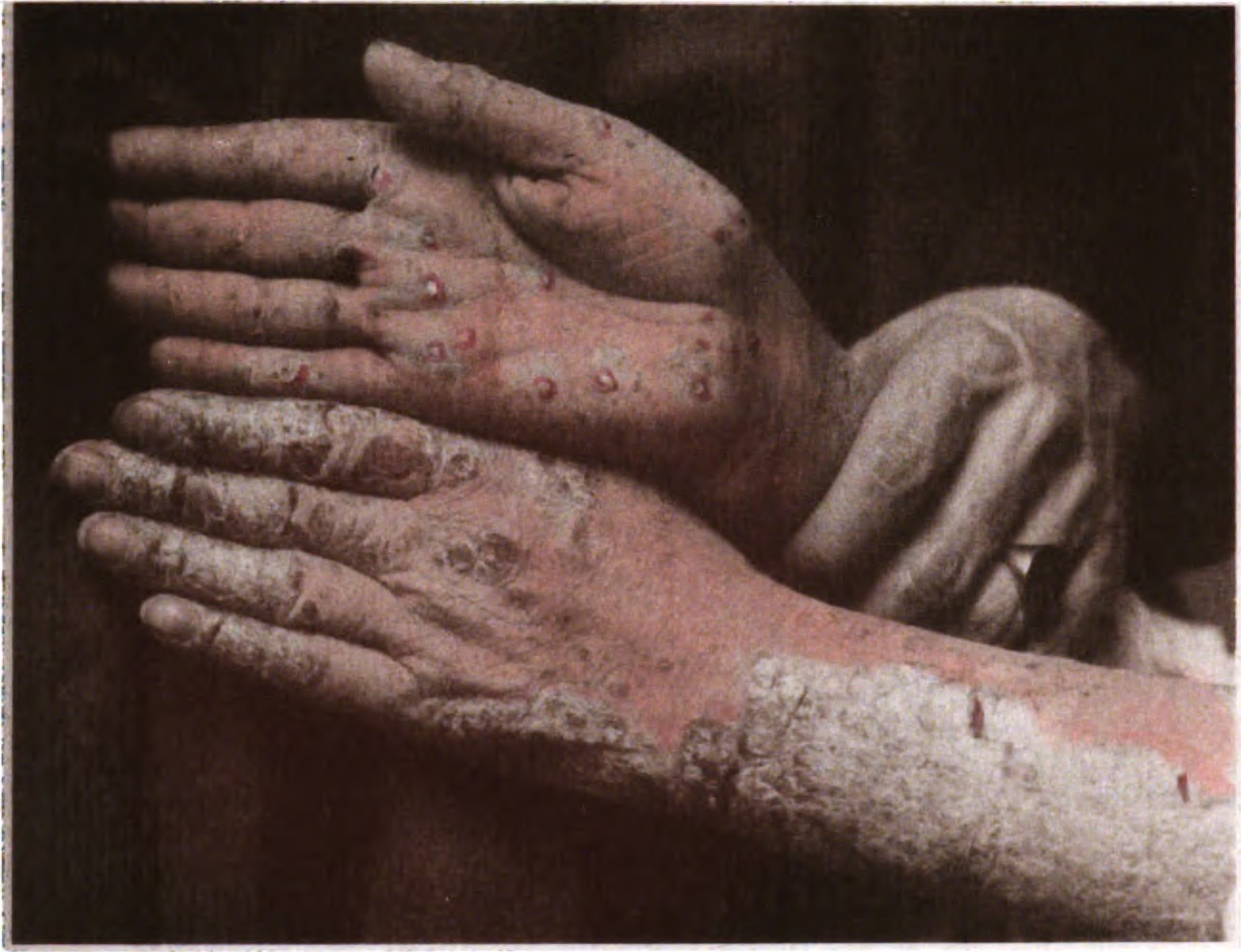 Psoriasis manum